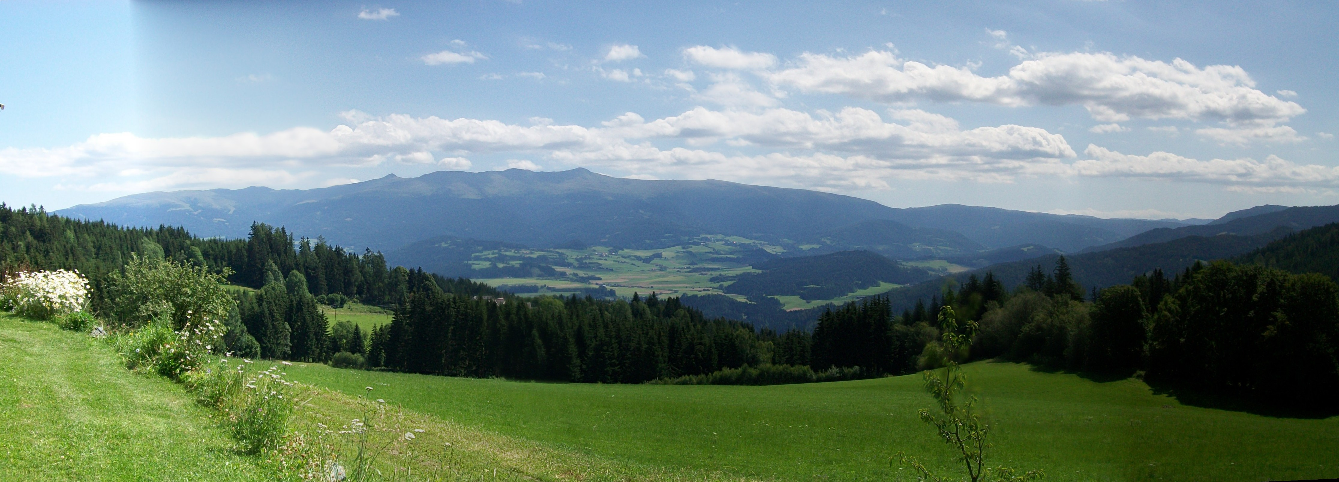 Blick zum Zirbitzkogel von der Grebenzen aus. View of Zirbitzkogl photographed from Grebenzen.